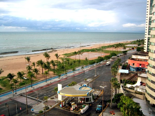 Vista do hotel onde fiquei em Recife - Pernambuco - Brasil. Esta é a praia dos tubarões. Dizem que eles correm atrás dos ambulantes na calçada (!).Praia de Boa Viagem